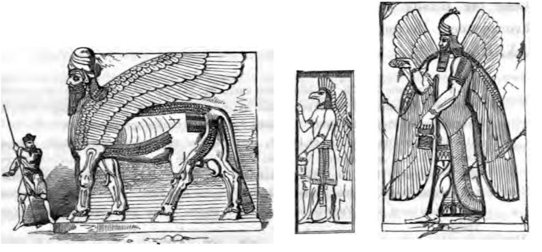 Relieff gjengitt i oppgitte verk